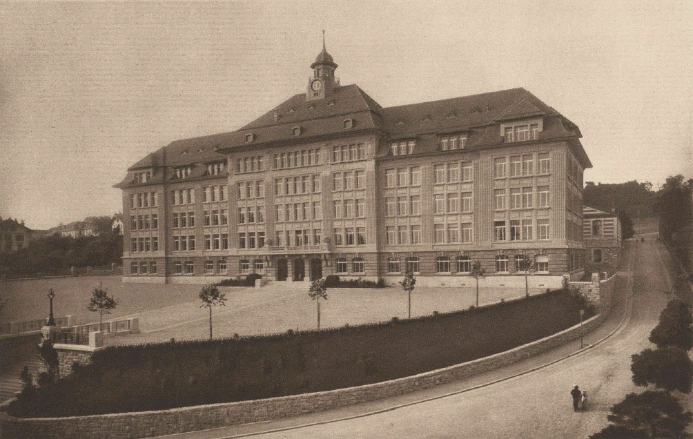 Handelsschule Lausanne, heute Gymnase de Beaulieu. Architekt: Maurice Schnell und Charles Thevenaz